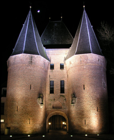 Korenmarktpoort Kampen bij nacht gezien vanaf de buitenzijde gelegen aan de IJsselkade, eigen foto 25 feb 2004 E van Herk. Copyrightvrij. Olympus c5050 zoom, F/8 1/3 seconde. Categorie:Afbeelding Kampen